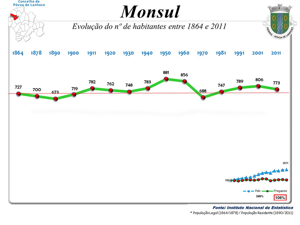 Censos 1864/2011